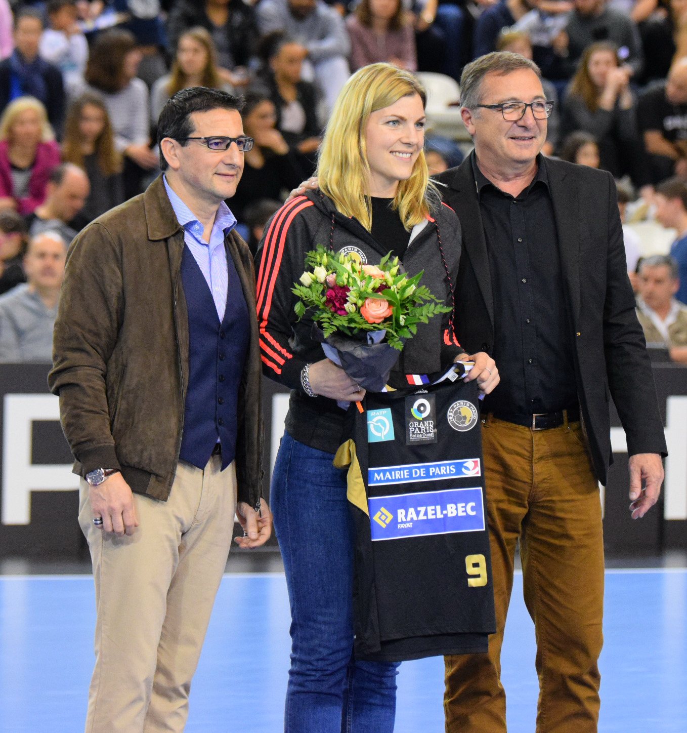 Présentation le 3 avril 2016 de Frida Tegstedt, joker médical au club Issy Paris HAnd, par le président du club Jean-Marie Sifre (à gauche) et Madani Harhad vice-président.